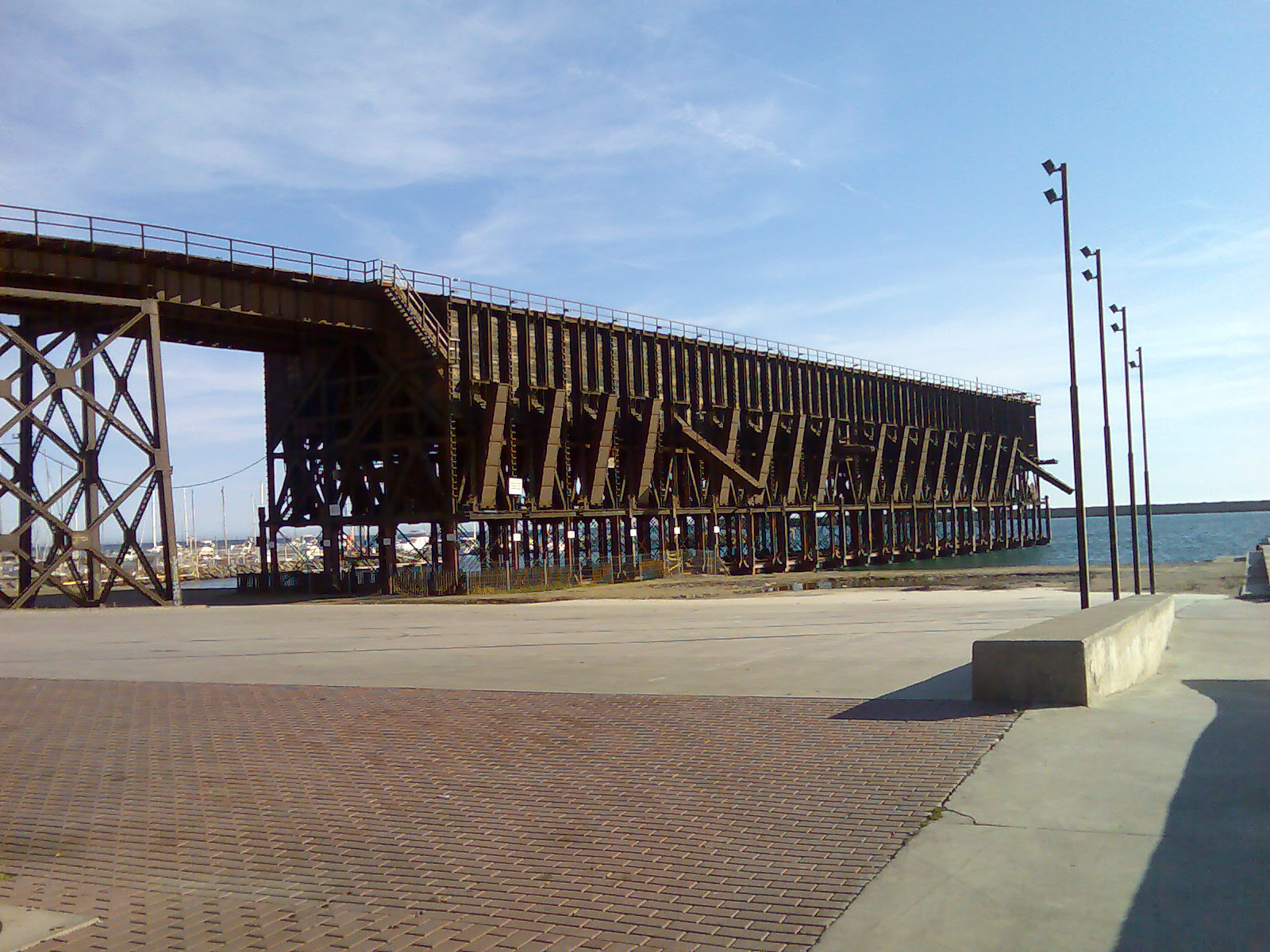 Cargadero mineral Almería